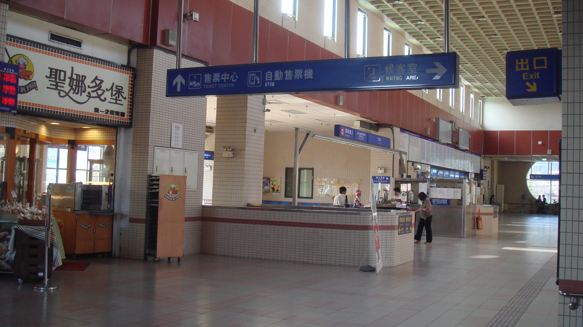 鶯歌車站內。